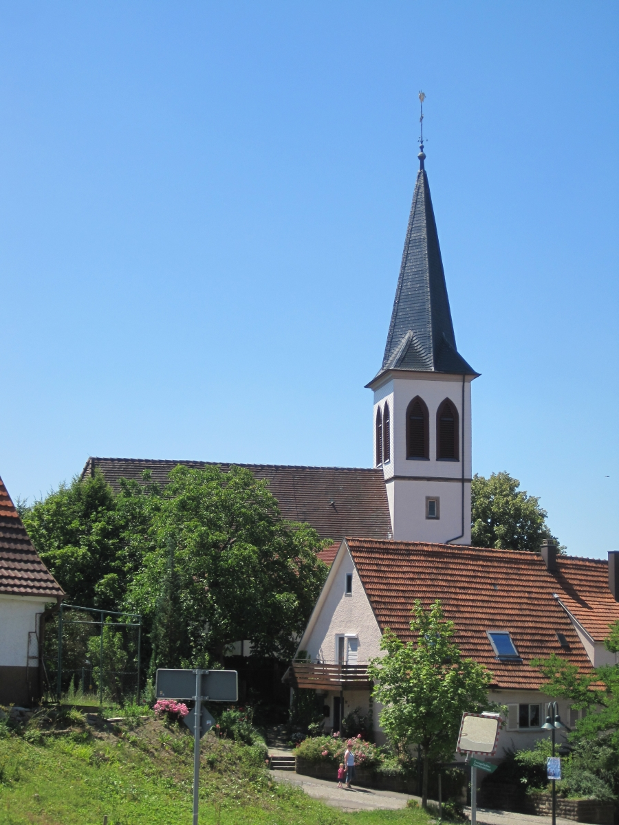 Evangelische Andreaskirche Großbettlingen. 1497 an Stelle eines Vorgängerbaus aus dem 8. Jahrhundert erbaut.